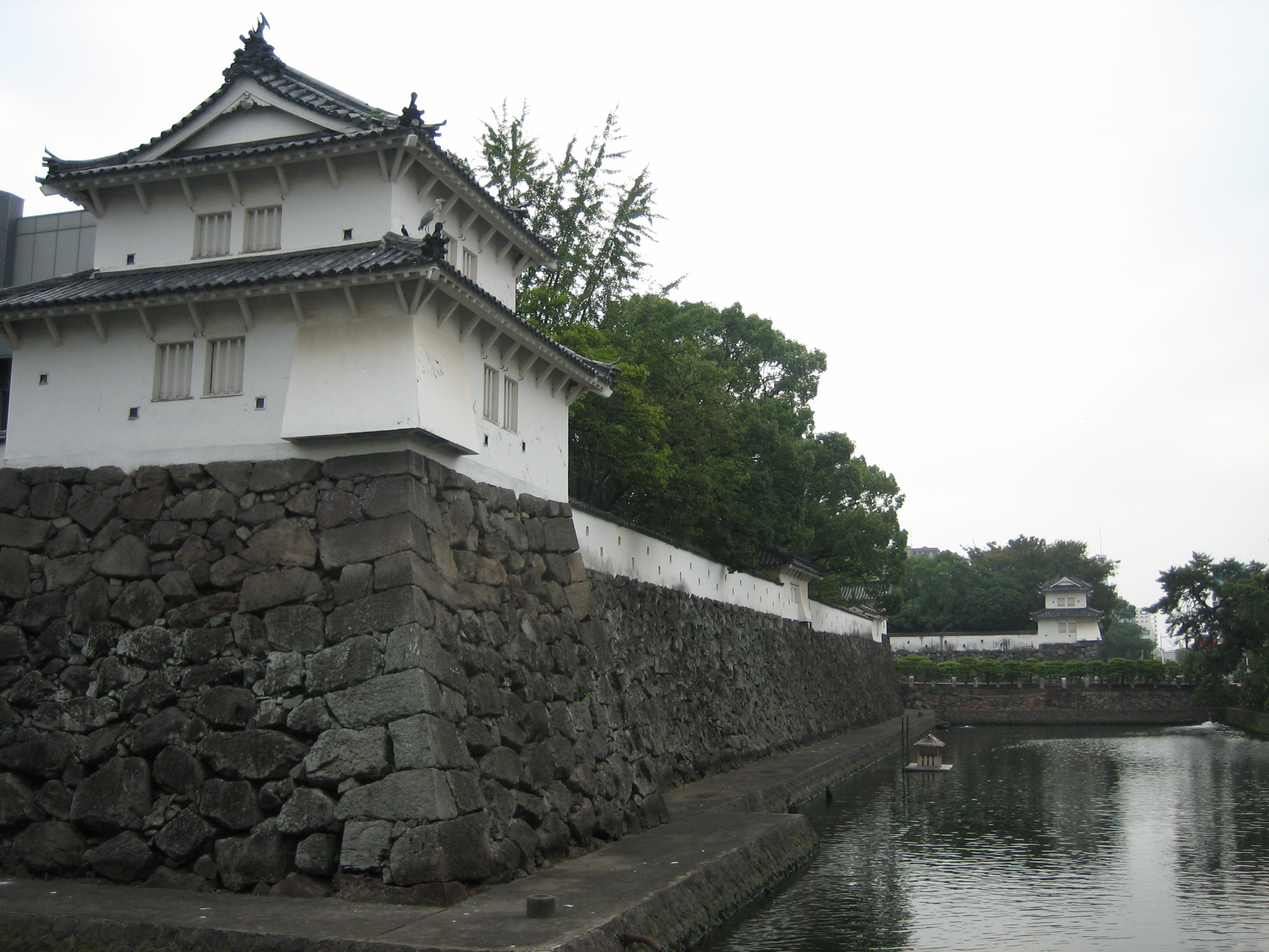 photo of Funai Castle Nijuu-yagura,Soumon-yagura in Nisinomaru and Touchaku-yagura in Higasinomaru